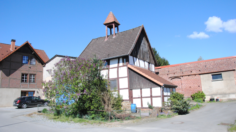 Pengelhuisken in Sommersell